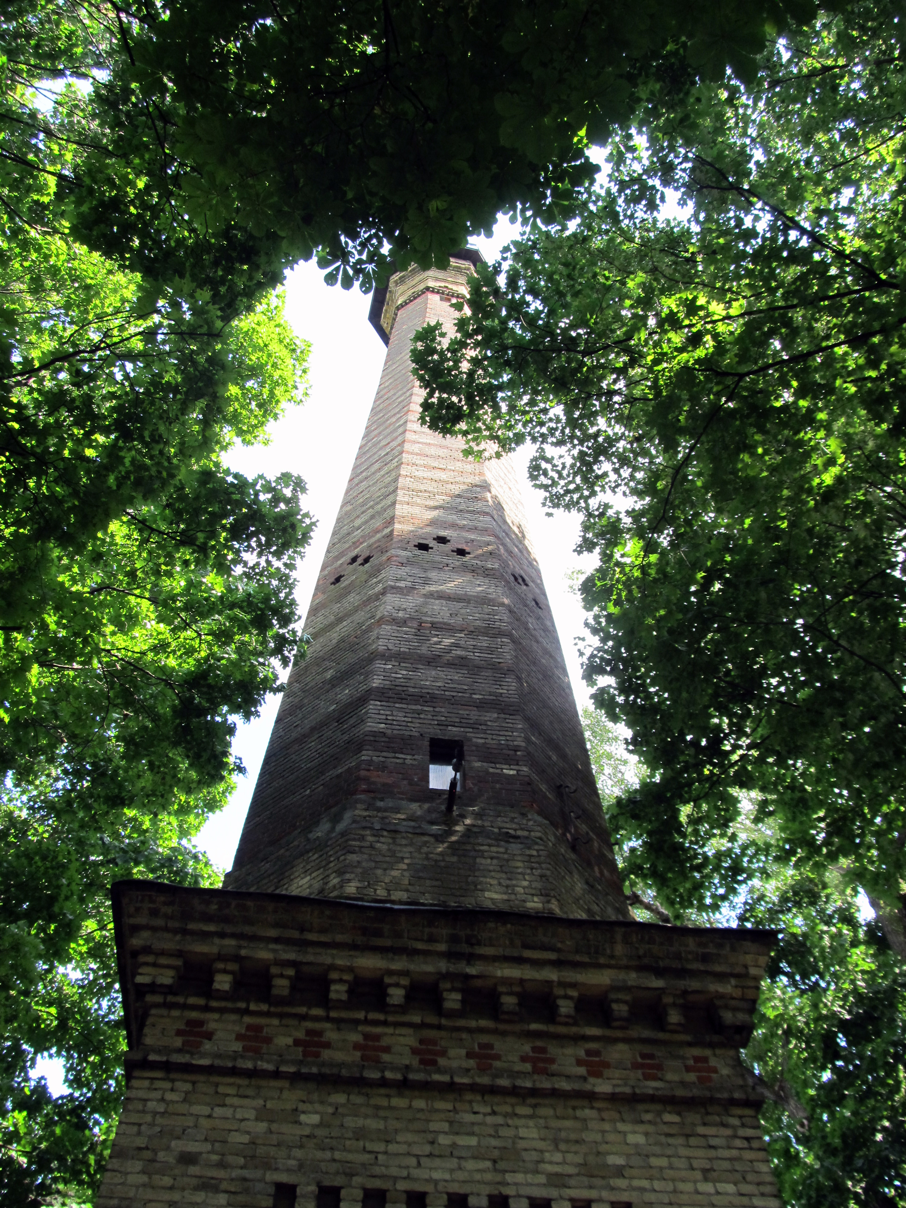 Беларуская (тарашкевіца): Будынак «Зімовы сад» зь вежай. г. Гомель This is a photo of Belarusian heritage monument. Reference number: 312Г000050 ( WLM)